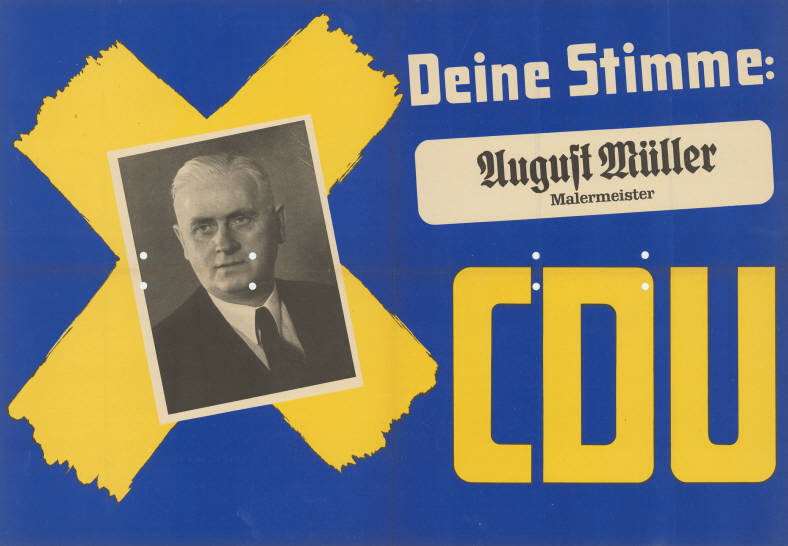 Deine Stimme: August Müller Malermeister CDU Abbildung: Porträtfoto - Stimmkreuz Plakatart: Kandidaten-/Personenplakat mit Porträt Objekt-Signatur: 10-009 : 173 Bestand: Landtagswahlplakate Nordrhein-Westfalen (10-009) GliederungBestand10-18: Landtagswahlplakate Nordrhein-Westfalen (10-009) » Landtagswahl am 18.6.1950 » CDU » mit Porträtfoto Lizenz: KAS/ACDP 10-009 : 173 CC-BY-SA 3.0 DE